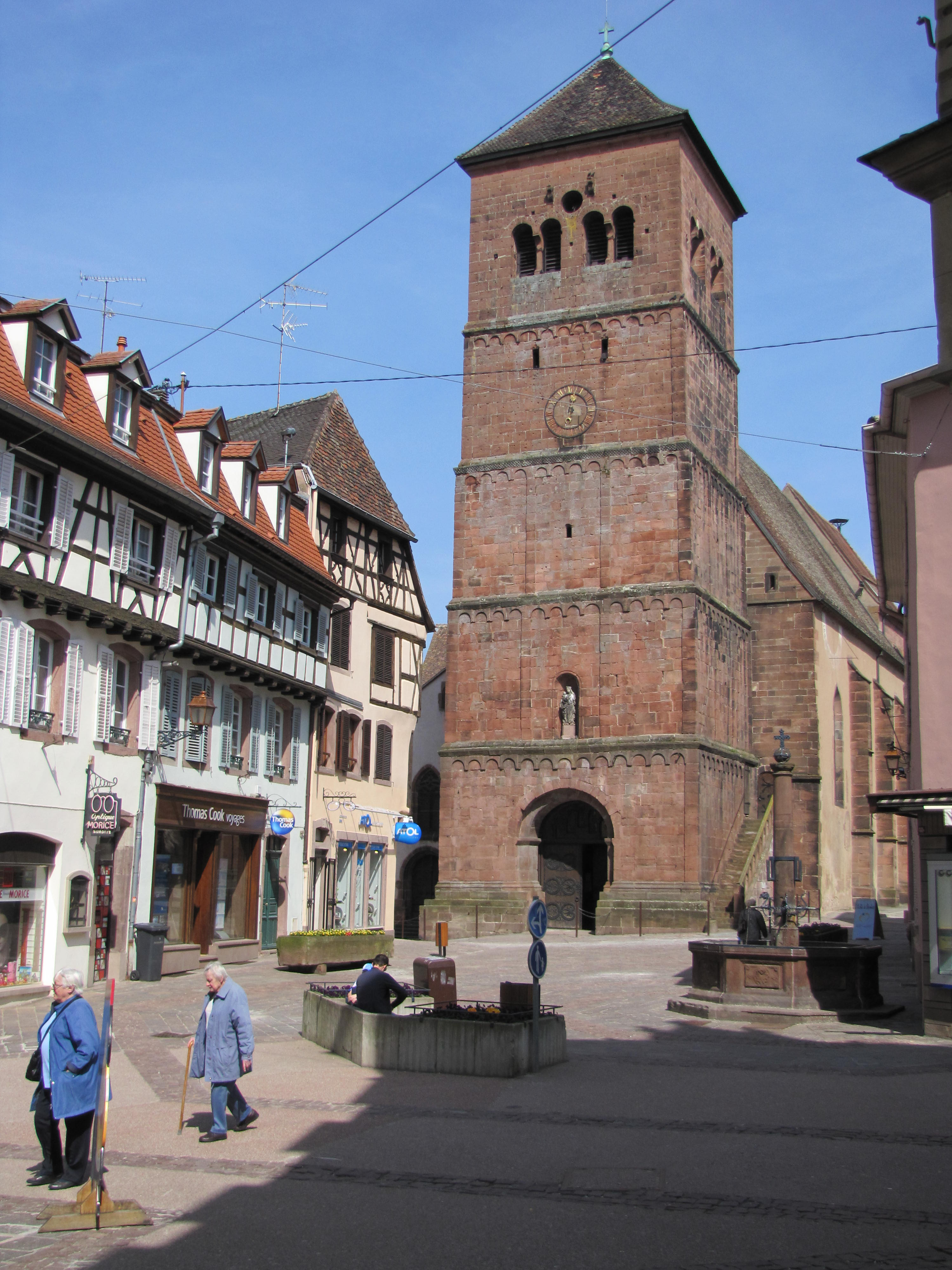 Alsace, Bas-Rhin, Saverne, Église Notre-Dame-de-la-Nativité (PA00084954, IA00055464).